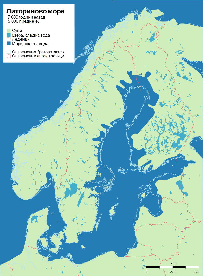 Приблизително очертание на Литориново море през 5 000 г.пр.н.е. Бялата лининия показва съвременната брегова линия